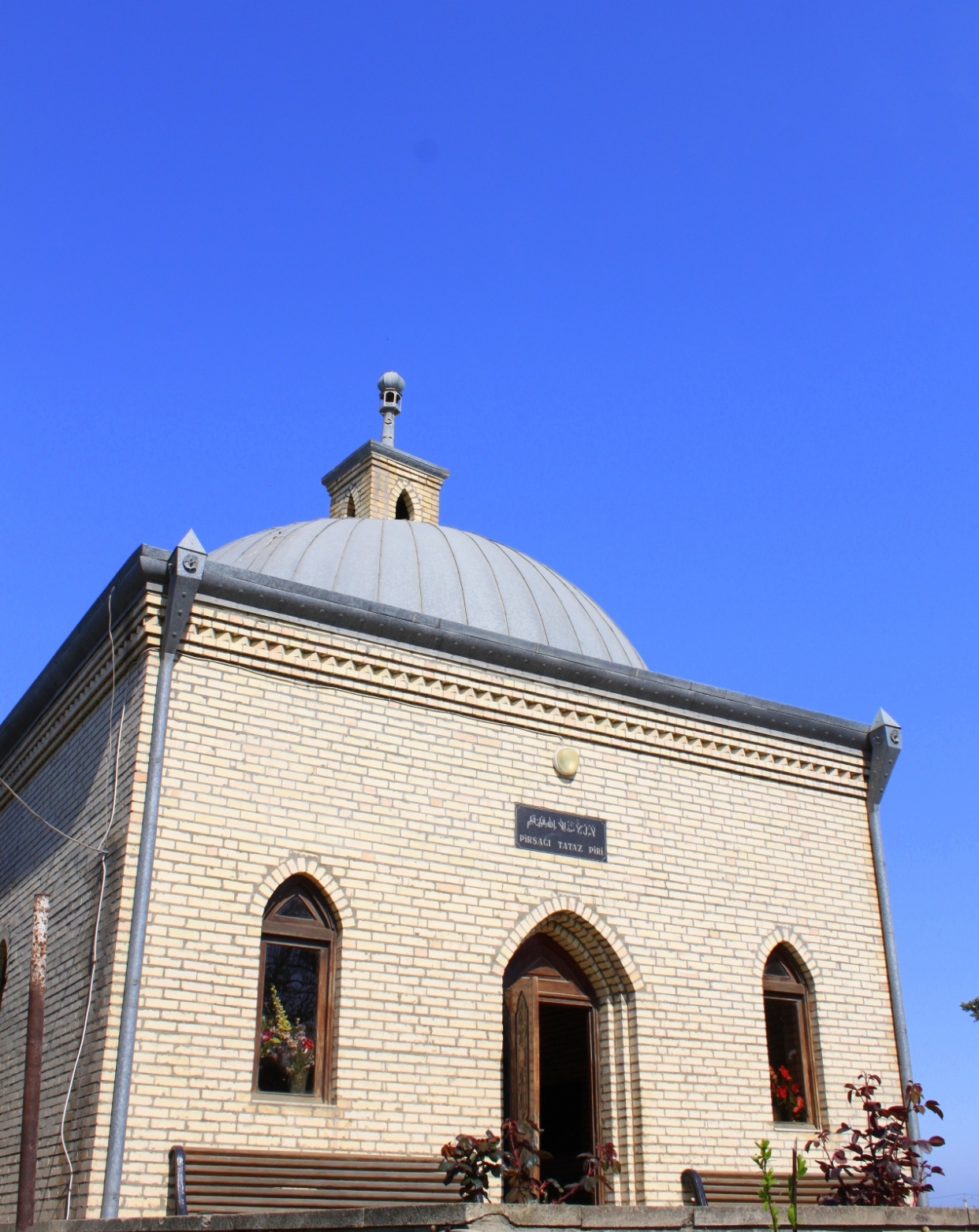 Pirşağı qəsəbəsində Tataz piri.